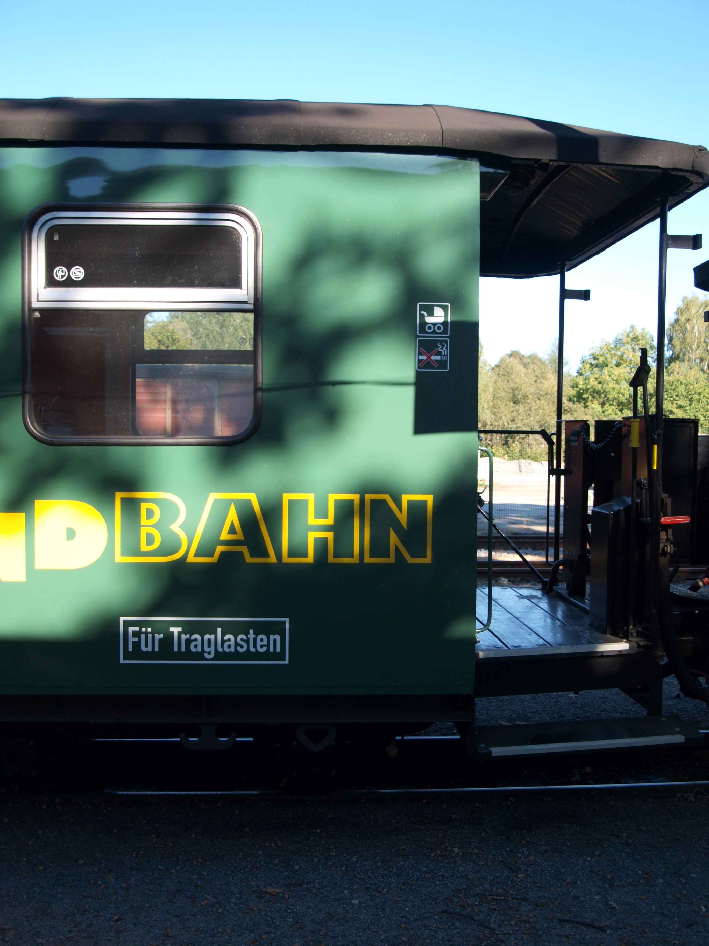 Traglastenabteil bei der Schmalspurbahn Radebeul Ost–Radeburg in Radeburg